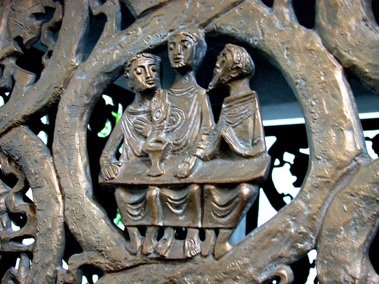 Kapelle Niederdonk, Büderich, Meerbusch, Germany